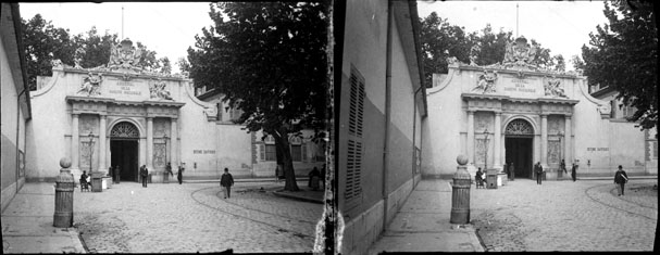 Fonds Trutat - Photographie ancienne Cote : TRU C 2186 Localisation : Fonds ancien (S 30) Original non communicable Titre : Entrée de l'Arsenal, Toulon, 9 mai 1905 Auteur : Trutat, Eugène Rôle de l’auteur : Photographe Lieu de création : Toulon (Var) Date de création : 1905 Mesures : : 4,5 x 5,5 cm Observations : Deux plaques. Note manuscrite de Trutat : " Toulon : entrée de l'arsenal, 9 mai 1905, Gaumont ". Mot(s)-clé(s) : -- Rue -- Pavement -- Arsenal -- Façade -- Entrée -- Porte -- Fronton -- Décor d'architecture -- Arbre -- Groupe -- Toulon (Var) -- Var (Provence-Alpes-Côte d'Azur) -- Provence-Alpes-Côte d'Azur (France) -- 20e siècle, 1e quart Médium : Photographies -- Négatifs sur plaque de verre -- Noir et blanc -- Vues d'architecture -- Gaumont Bibliothèque de Toulouse. Domaine public